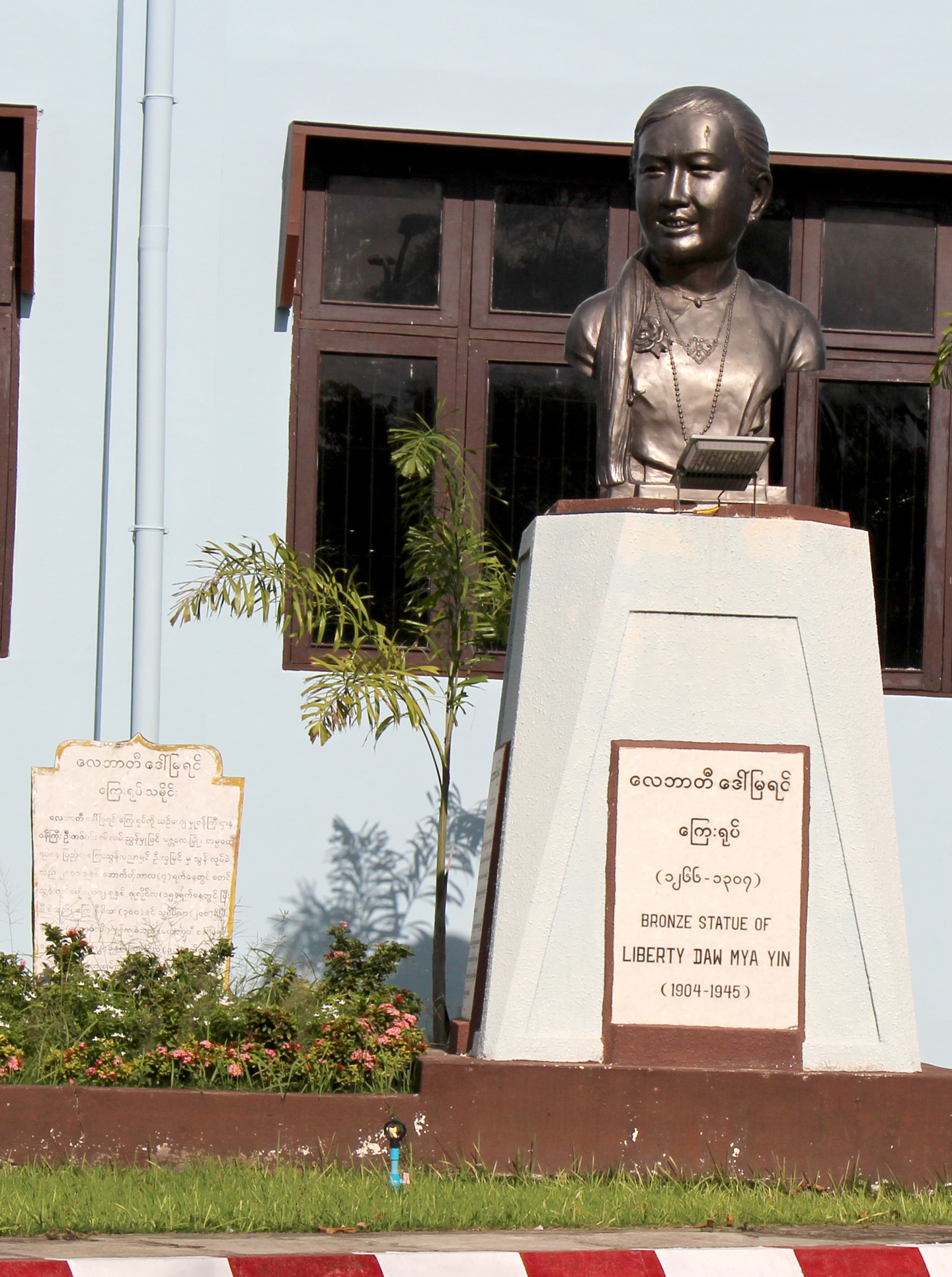 မြန်မာဘာသာ: မန္တလေး အမျိုးသား ကဇာတ်ရုံ ရှေ့ရှိ လေဘာတီ မမြရင် ရုပ်ထု